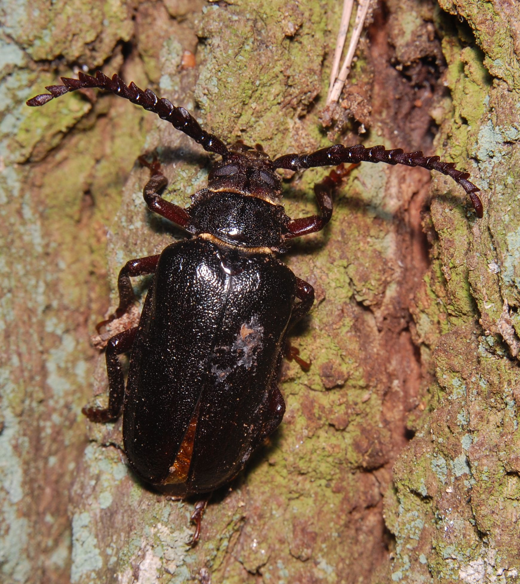 Sägebock (Prionus coriarius), Grunewald, Berlin, am Fuß einer abgestorbenen Eiche